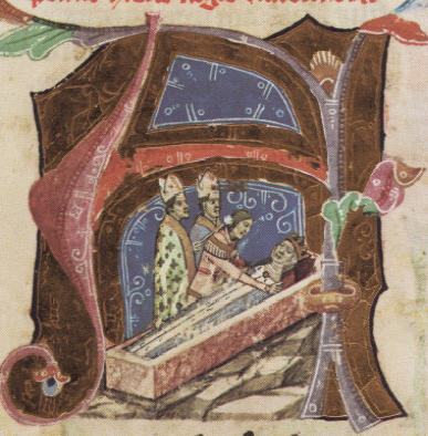 Marie Bytomská